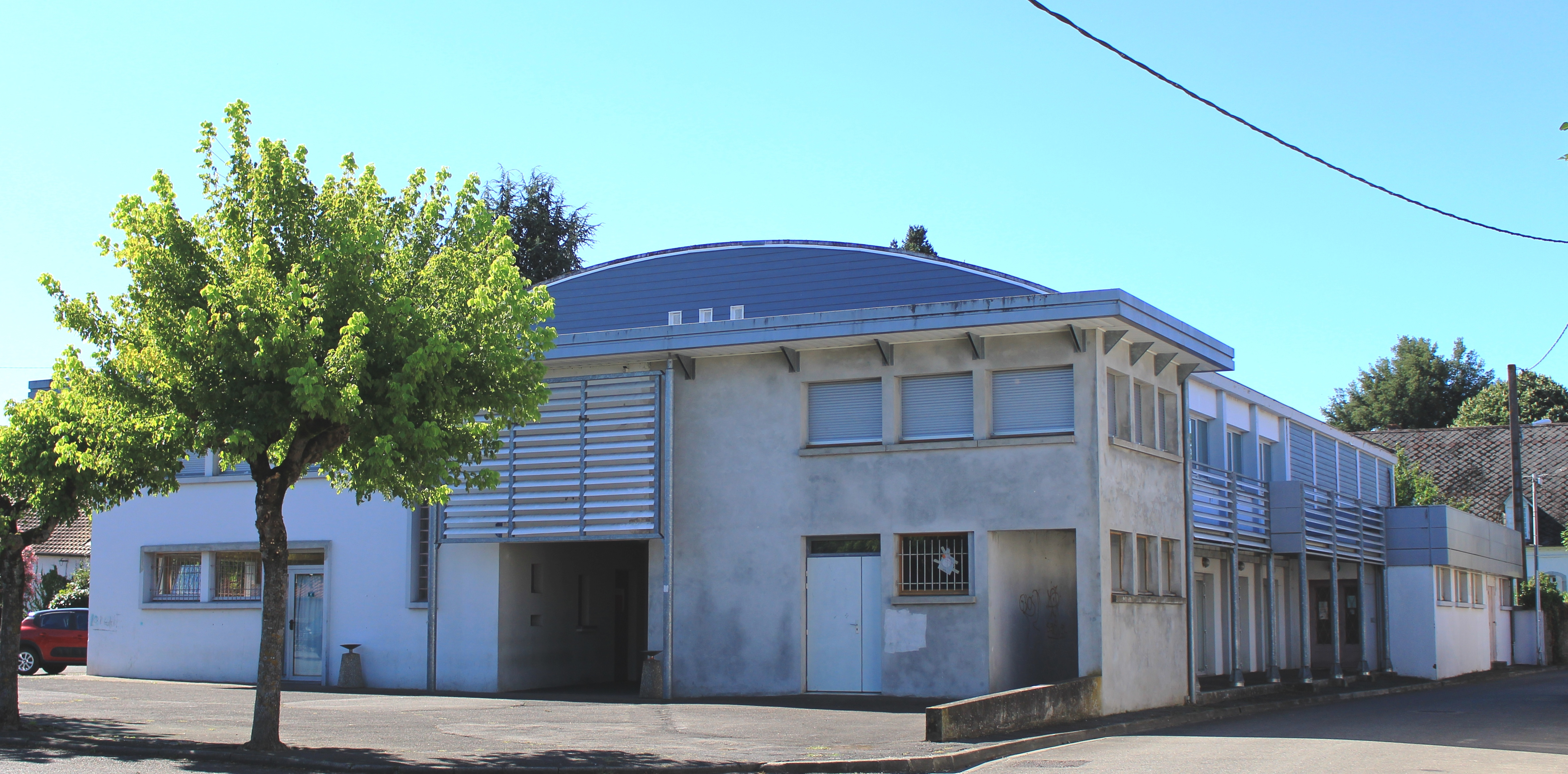 Salle des fêtes de Bazet (Hautes-Pyrénées)